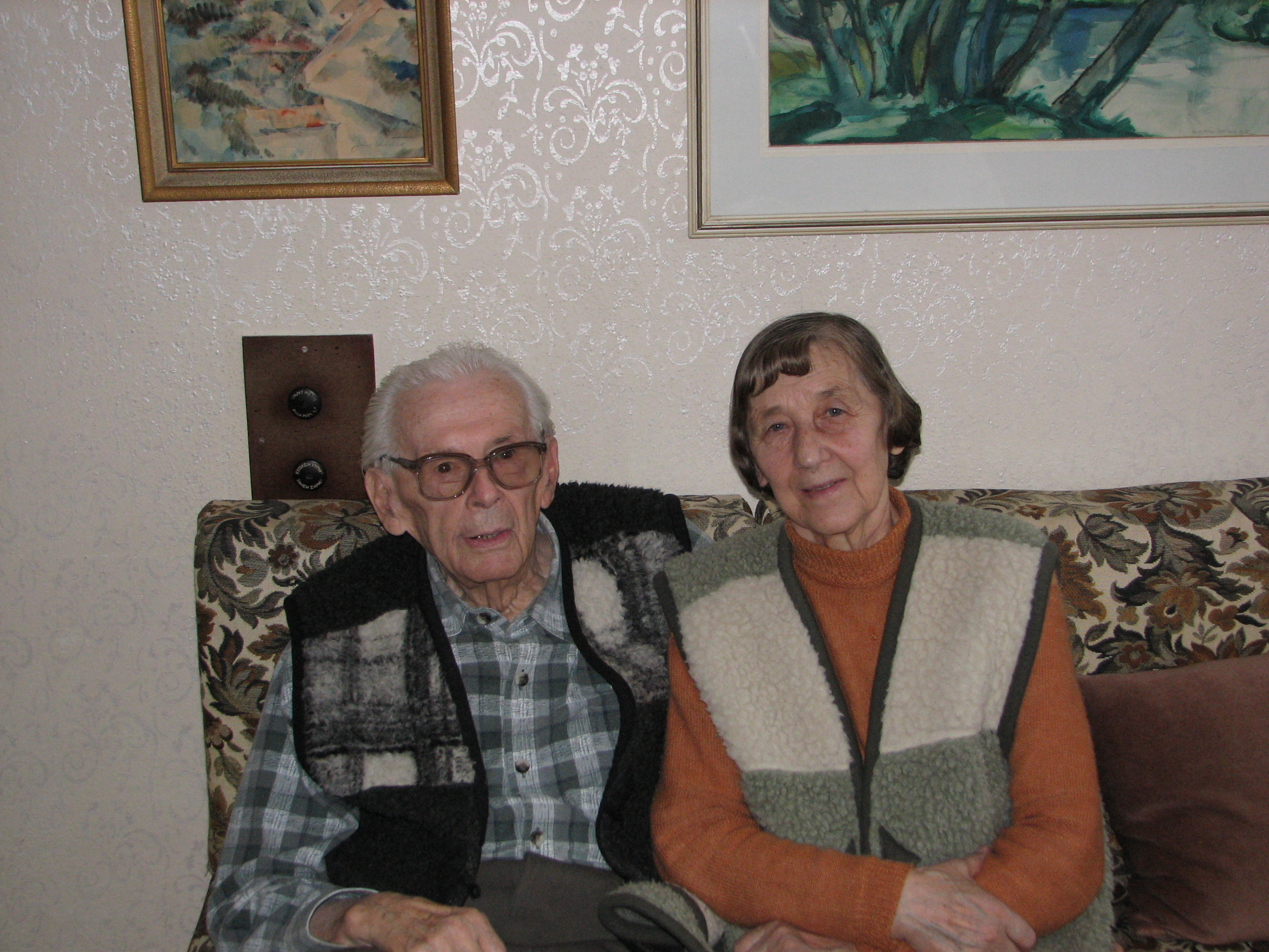 Karel Zámečník s mažnelkou Květoslavou